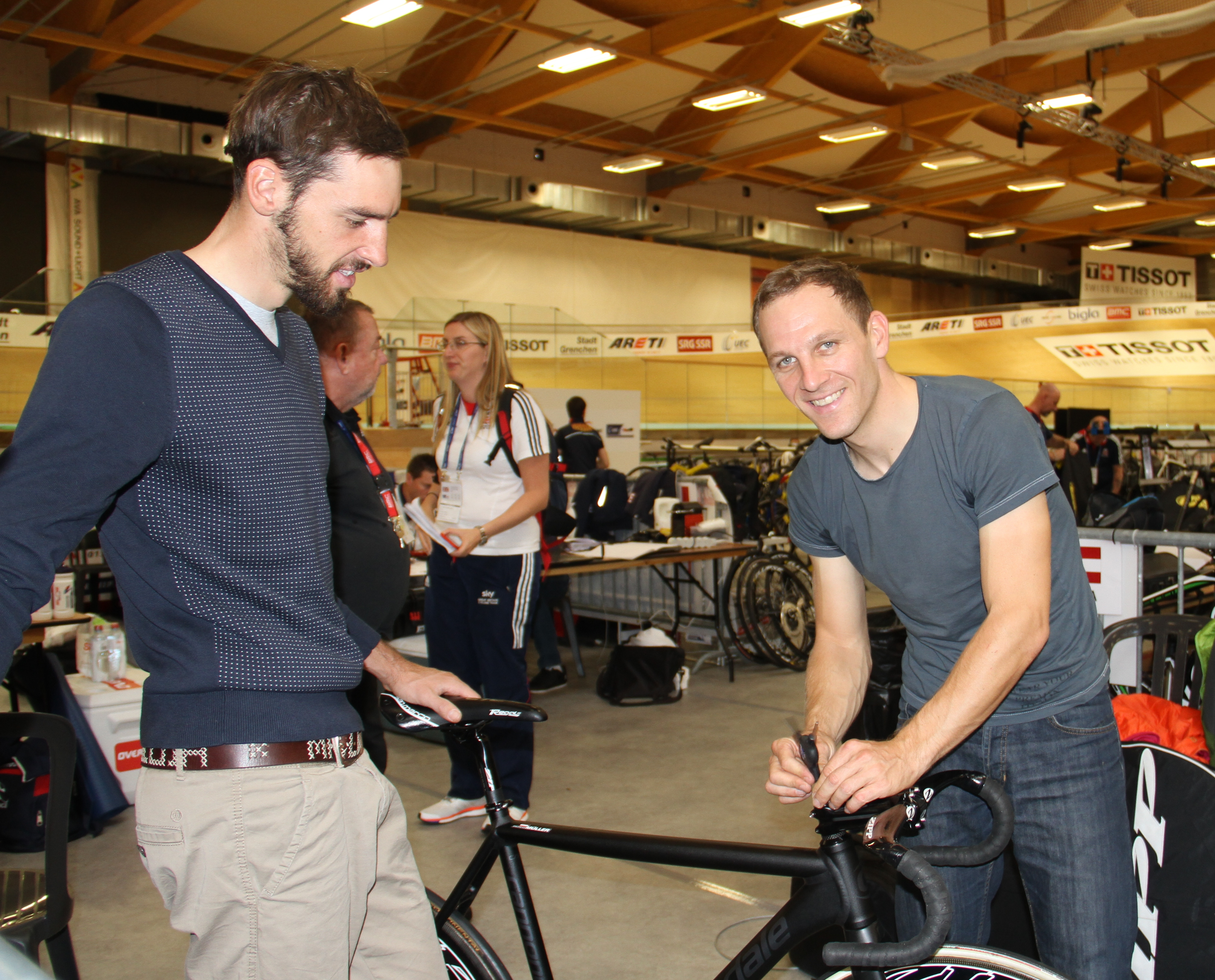 Andreas Graf (l.) und Andreas Müller, österreichische Radsportler The making of this document was supported by the Community-Budget of Wikimedia Germany.